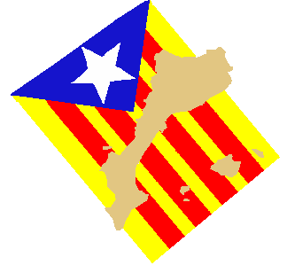 Origen